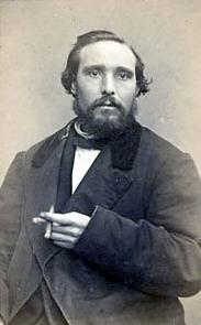 Galdric Verdaguer